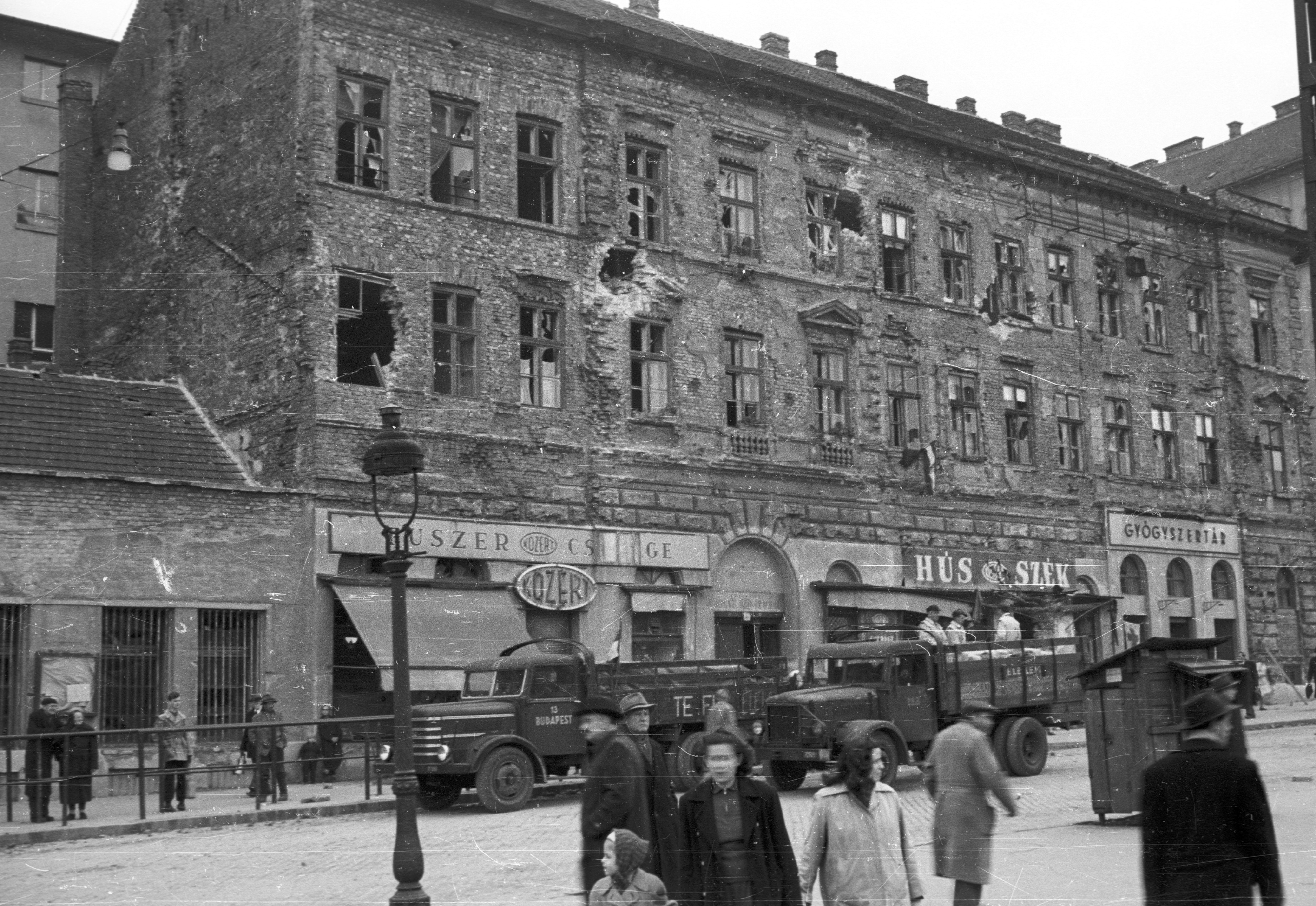 Széna tér 1/a. Location: Hungary, Budapest I. Tags: war damage, Csepel-brand, pedestrian, commercial vehicle, pharmacy, butcher shop, revolution, lamp post, damaged building, sign-board, booth, Hungarian brand, Budapest Title: Széna tér 1/a.